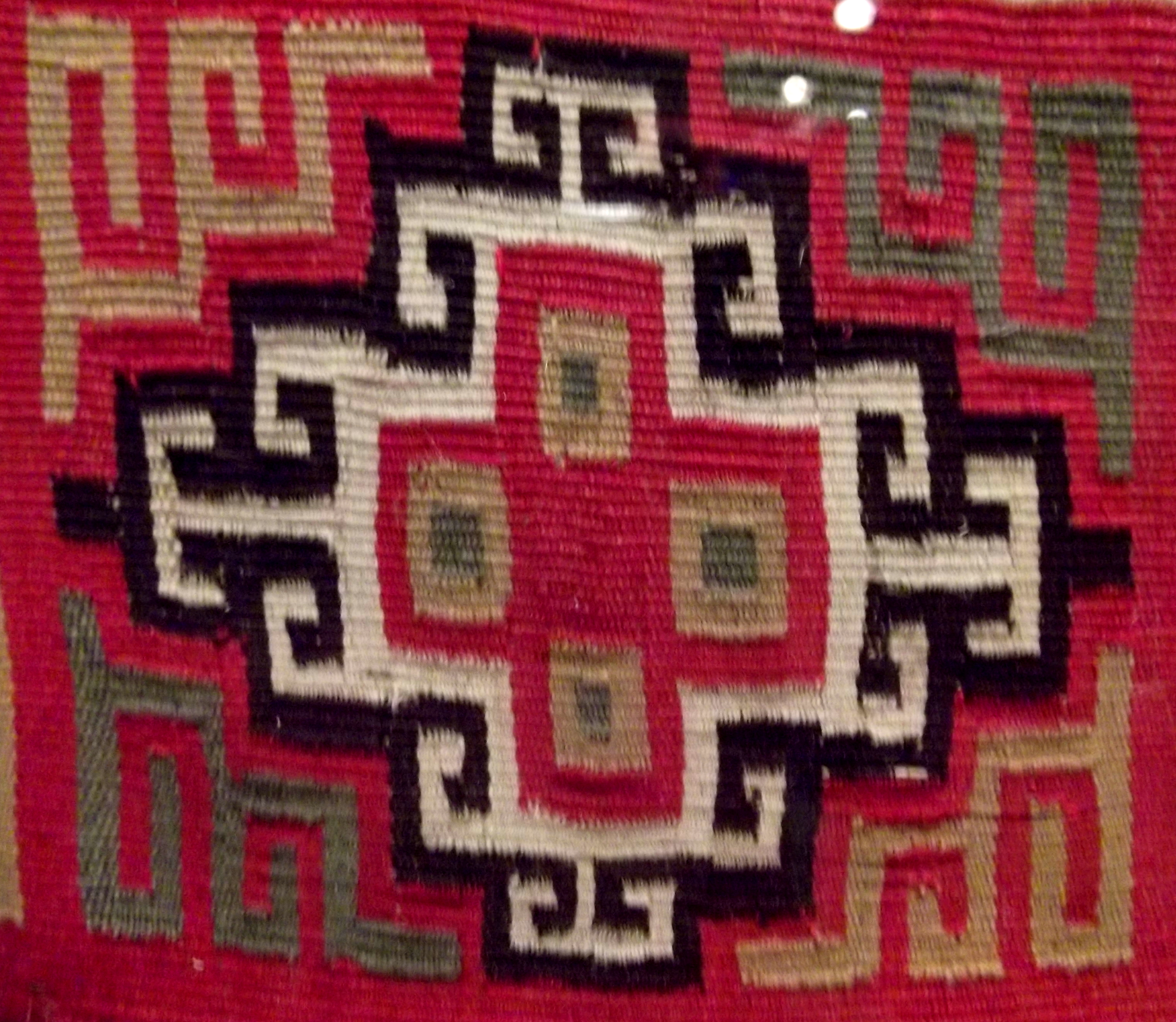 Detalle de un "uncu", una pieza textil inca, donde puede verse representada una chakana o cruz andina. El objeto pertenece a la colección de objetos arqueológicos peruanos del Museo de América, Madrid, España. Se cree que el uncu data de principios de la época colonial peruana.